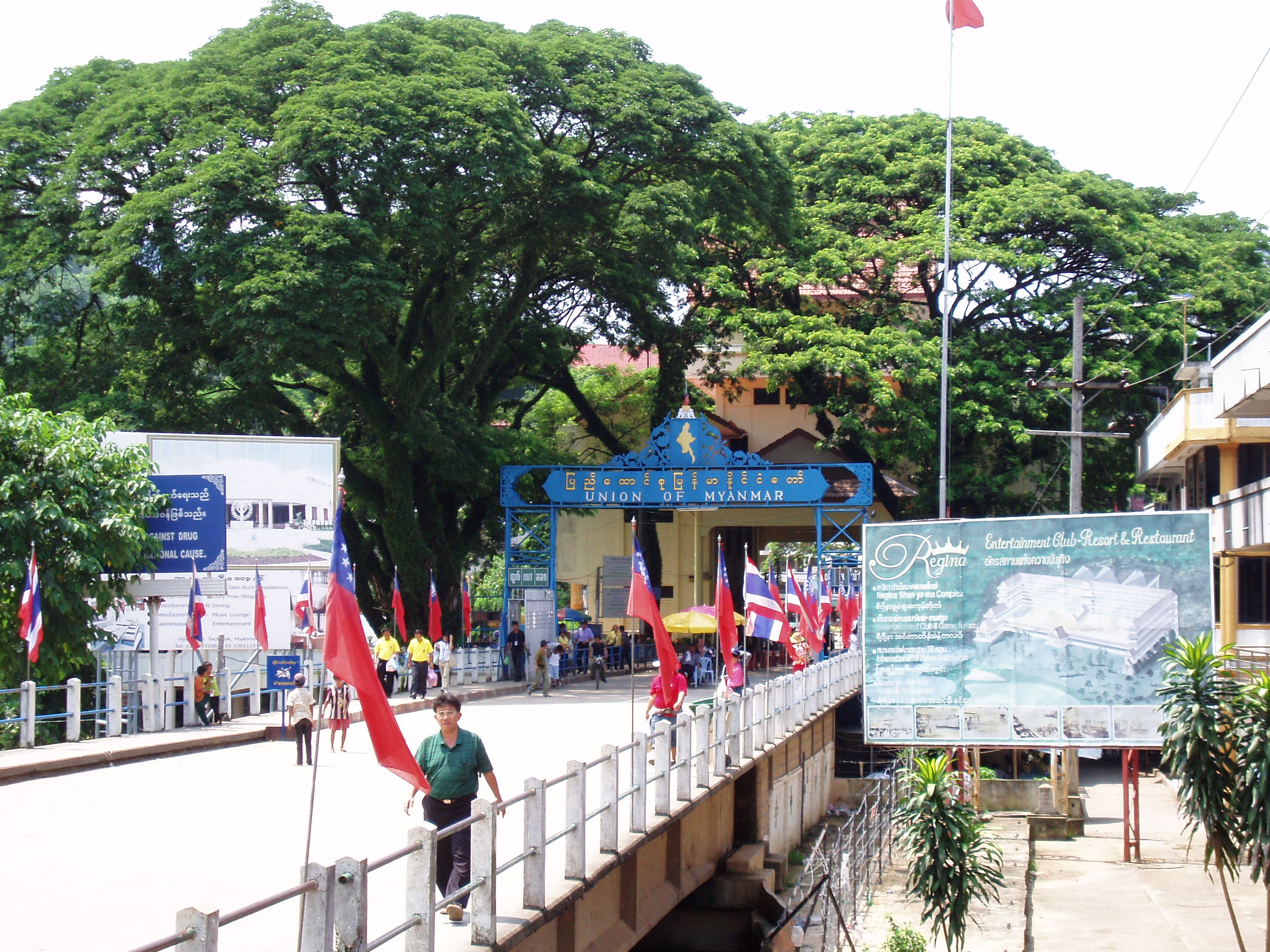 Myanmar-Thailand bridge in Mae Sai, Chiang Rai. Thailand